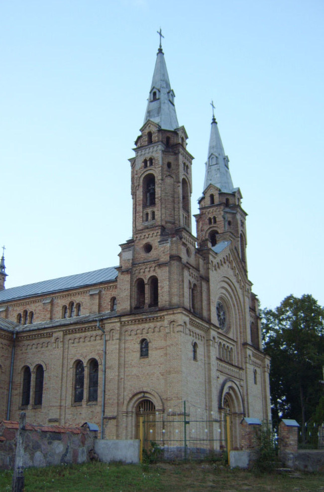 Беларуская (тарашкевіца): Касьцёл Сьвятога Міхаіла Арханёла ў Белагрудзе